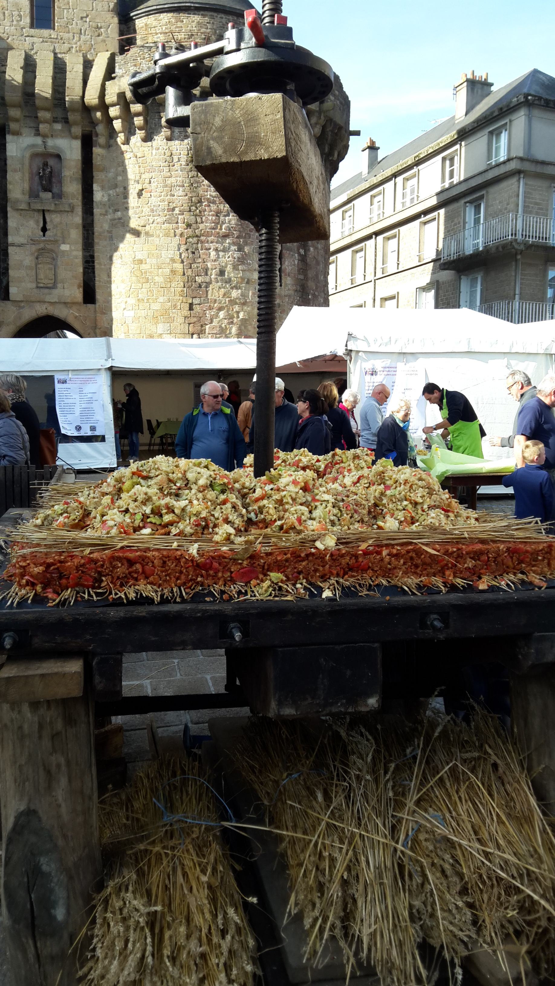 Montage des lits de pommes préalablement écrasées, séparés par des couches de paille avant le pressage lors de la fabrication du cidre. Fête du cidre nouveau, octobre 2018, Vire, France